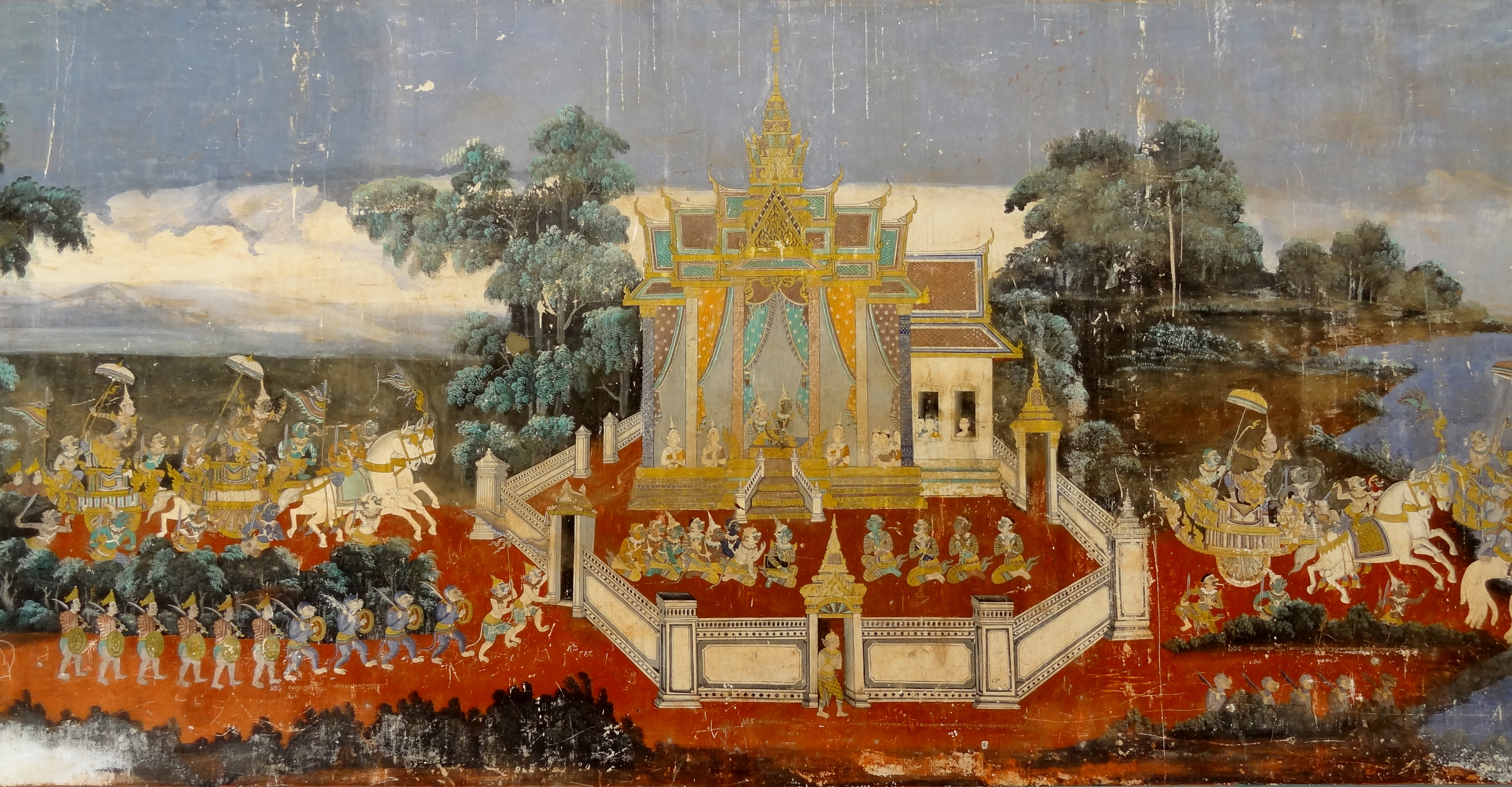 Wandgemälde neben der Silberpagode auf dem Gelände des Königspalasts von Phnom Penh, Kambodscha